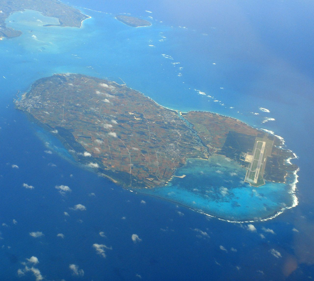 Irabu-jima from sky: Irabu Island, Miyako city, Okinawa, Japan / 沖縄県伊良部島（空撮）